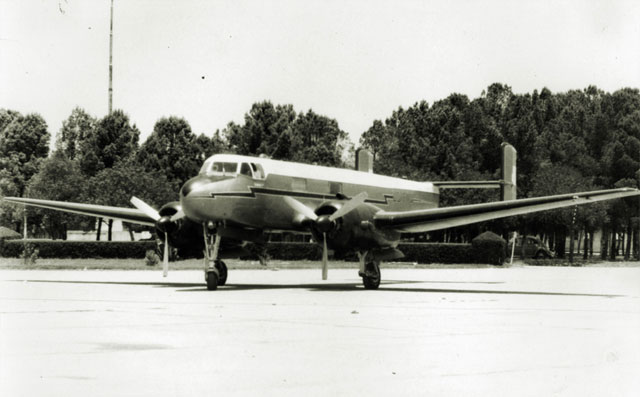 Avión de la Fábrica Militar de Aviones de Córdoba